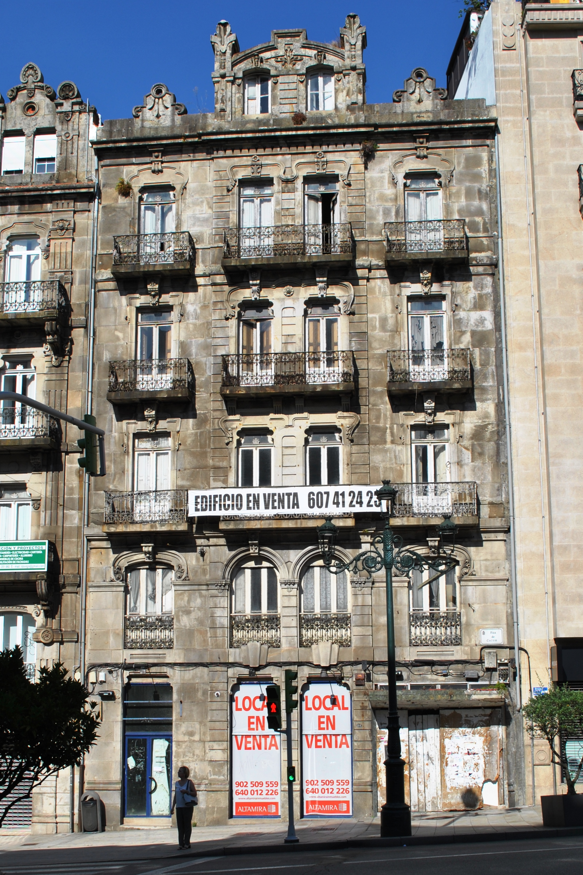 Véxase o título e as categorías.